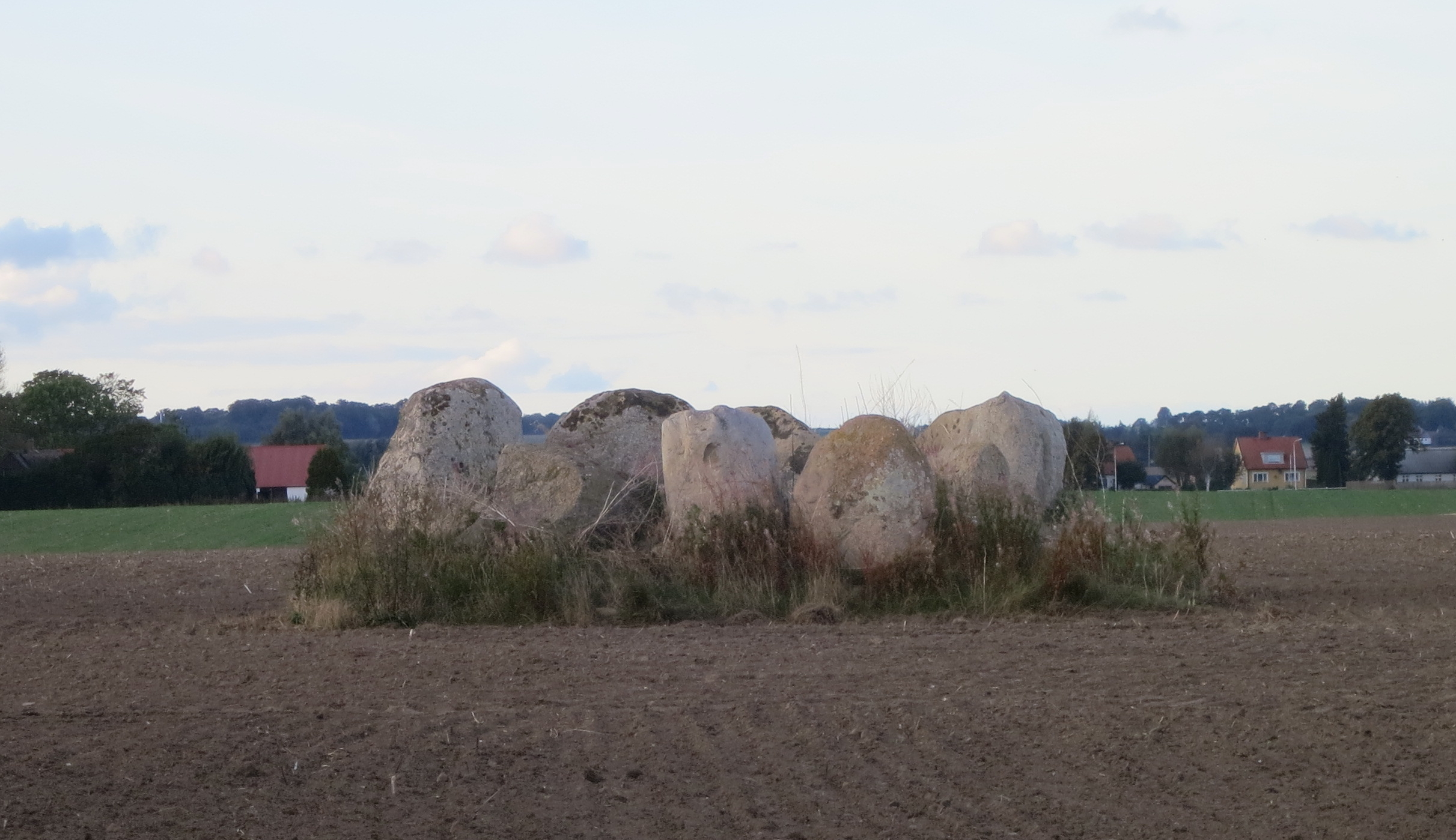 Skrepphög? (Ingelstorp 10:1)